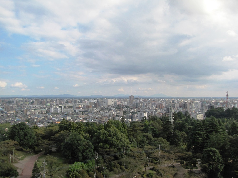 説明：宇都宮タワーから宇都宮市南東部を望む。 場所：栃木県宇都宮市の八幡山宇都宮タワー展望台。 日付：2010年10月2日。 撮影者：投稿者と同じ。 ライセンス：